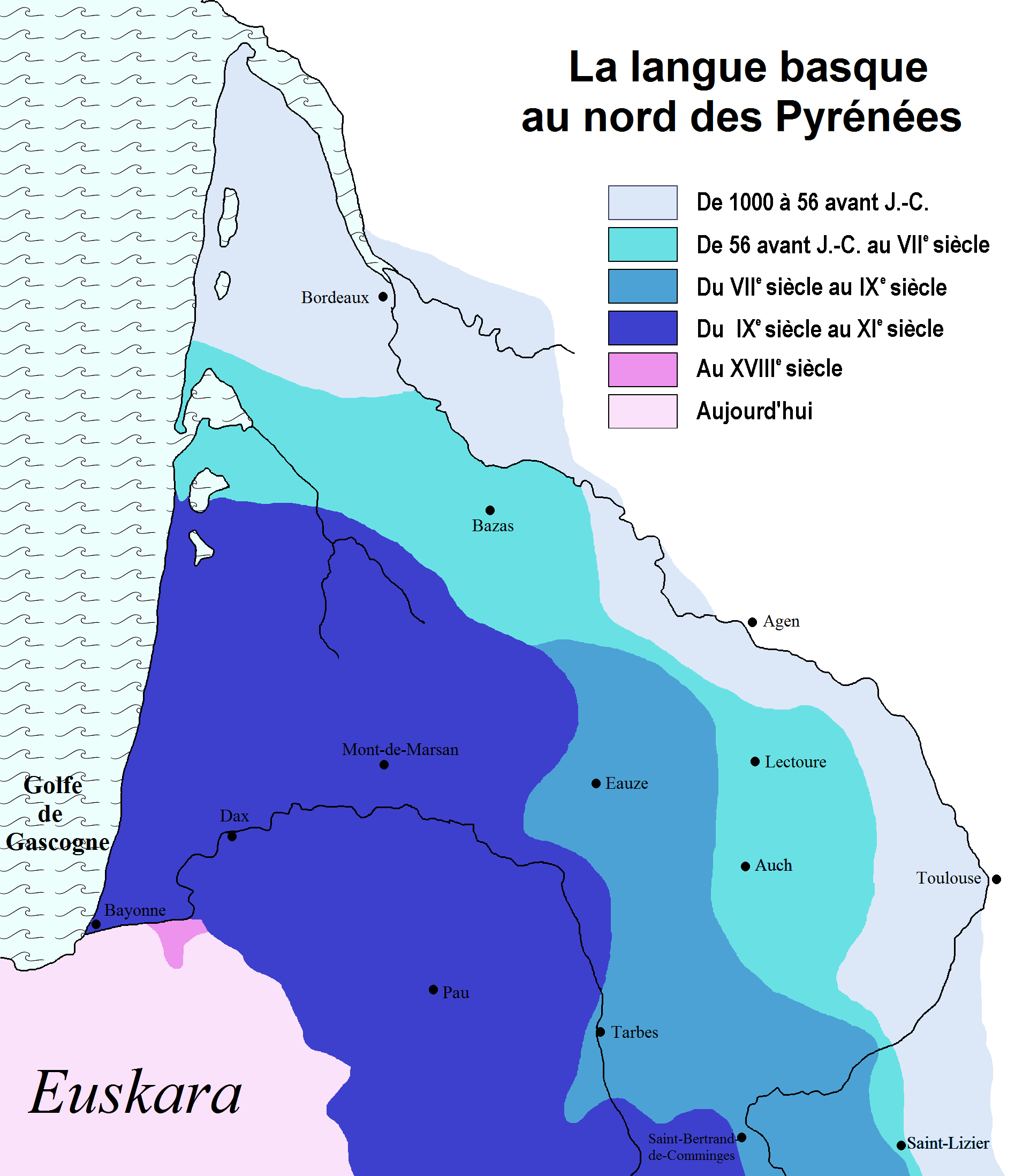 Recul du basque au nord des Pyrénées au profit du latin vulgaire, de langues romanes primitives, puis du gascon.